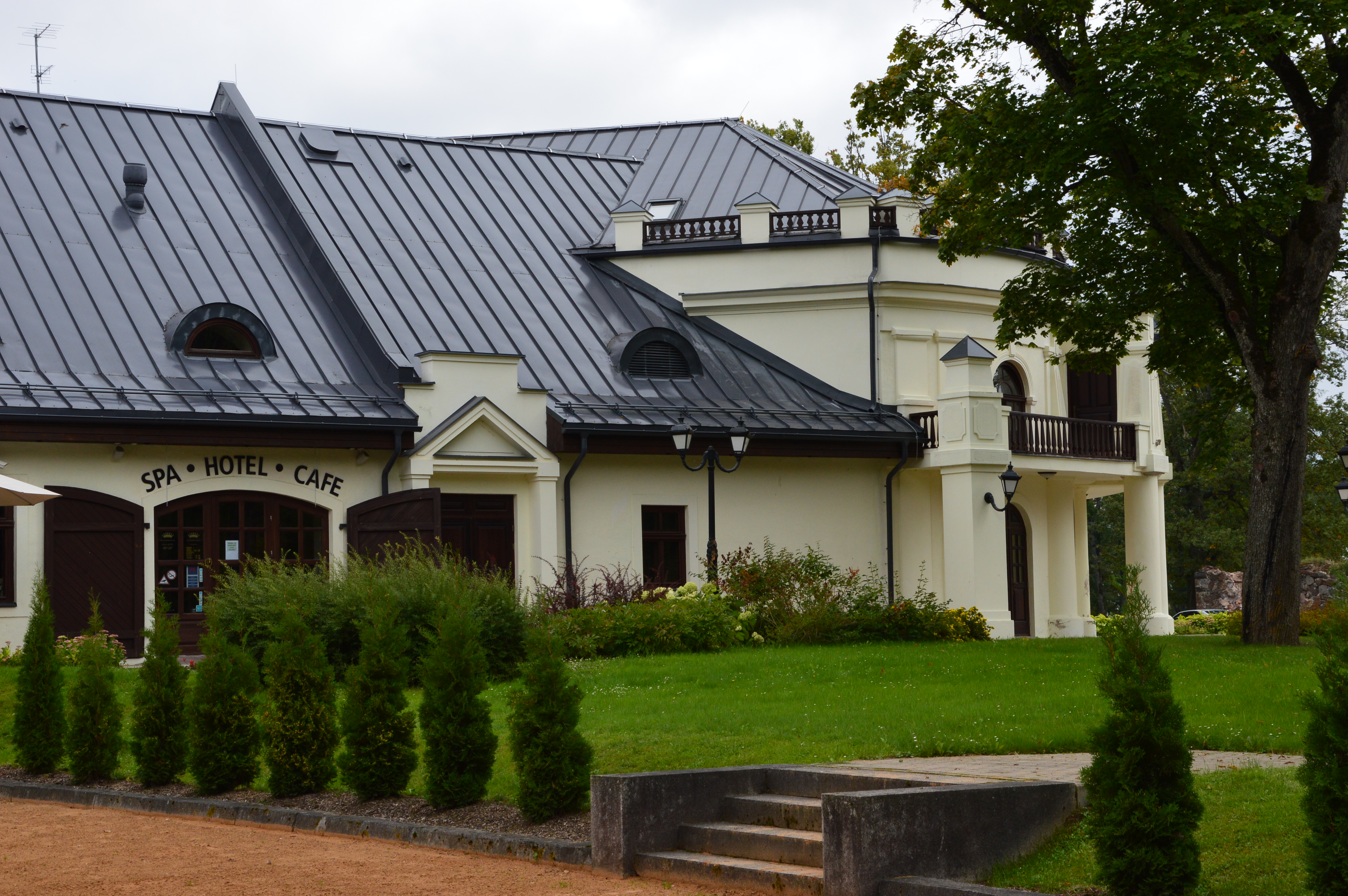 Vana-Gulbene mõisa hooned